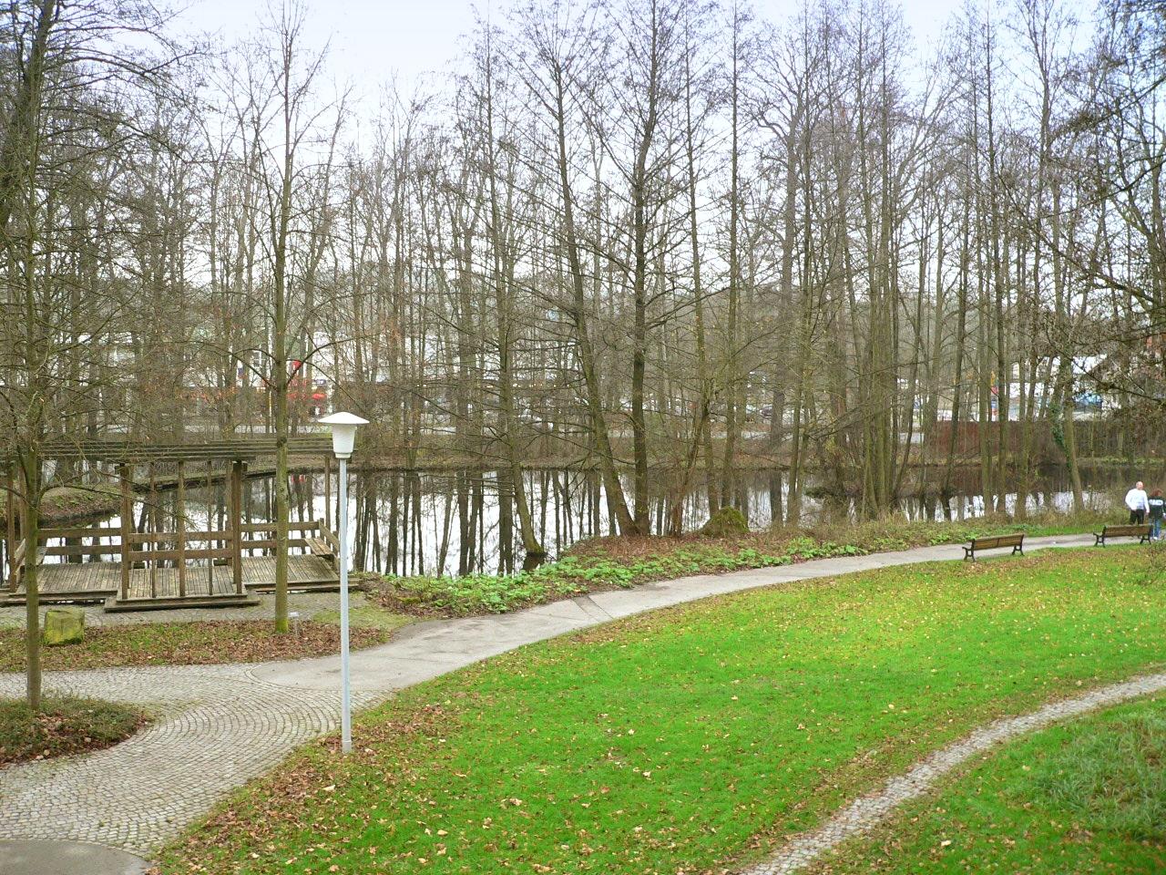 Teich im Park von Schloss Ketschendorf (Coburg)